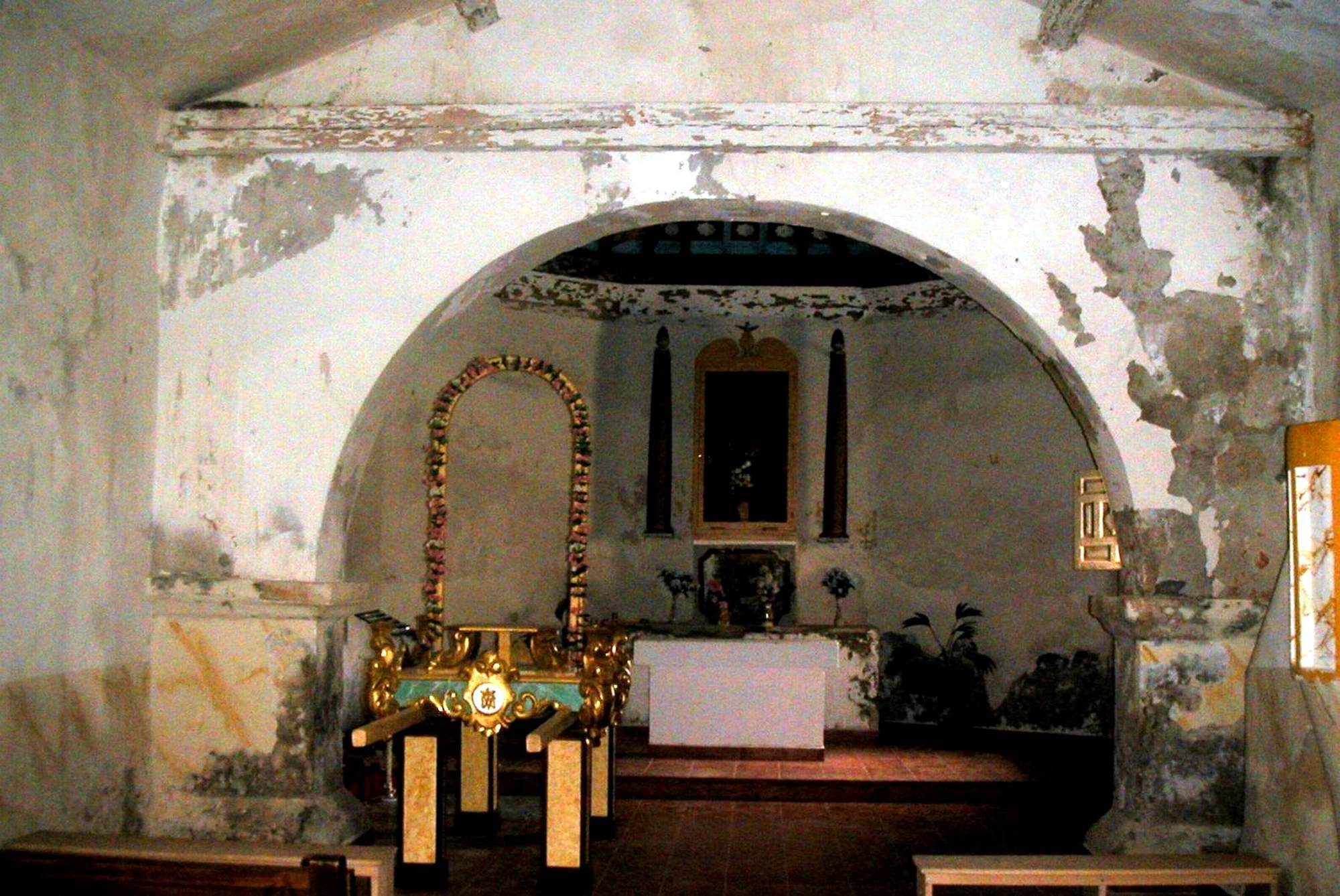 Vista interior de la ermita de Santerón, Algarra (Cuenca), con detalle del arco y presbiterio (antes de su restauración), año 2006.